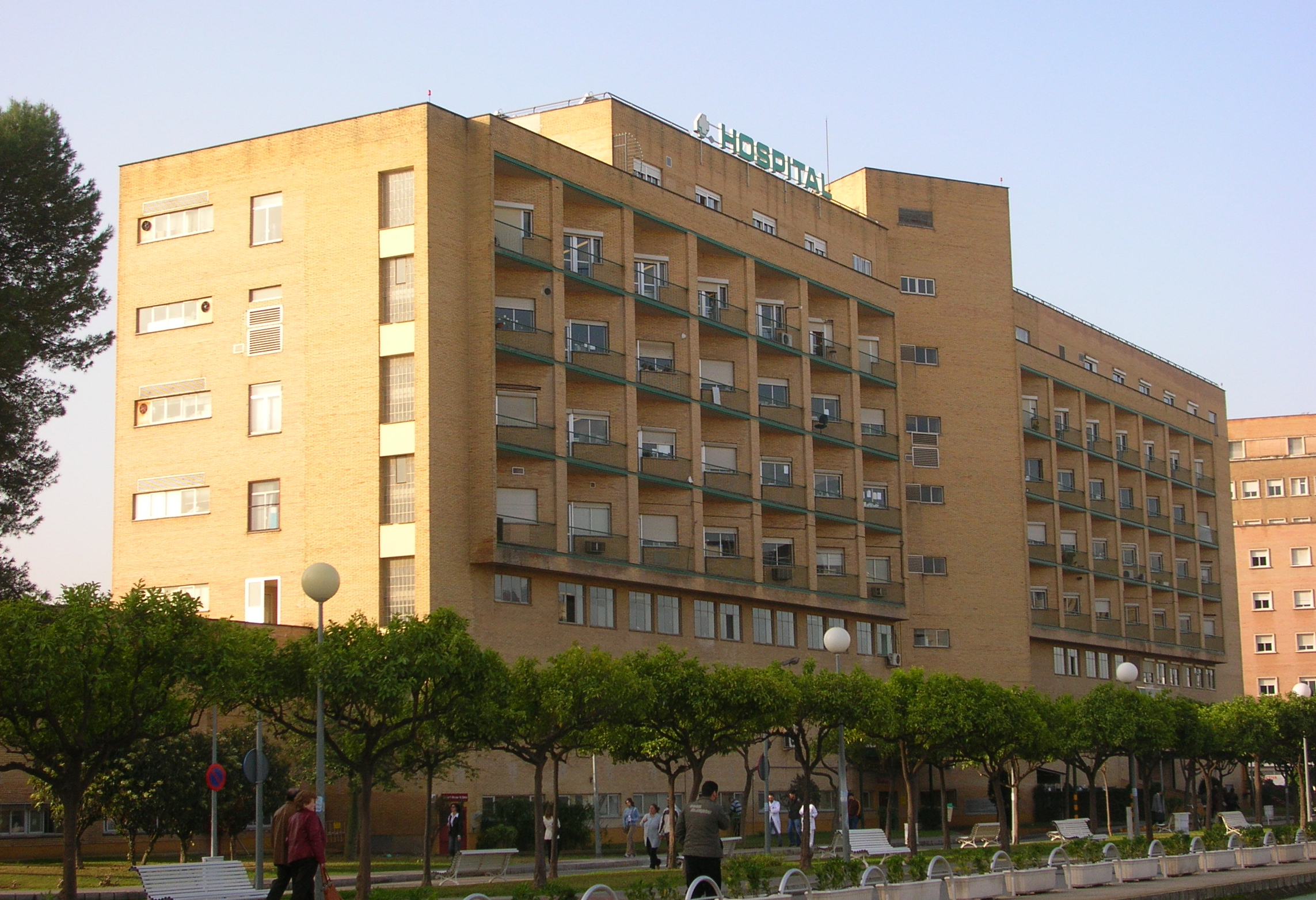 Edificio de los laboratorios de los hospitales Virgen del Rocío, Sevilla